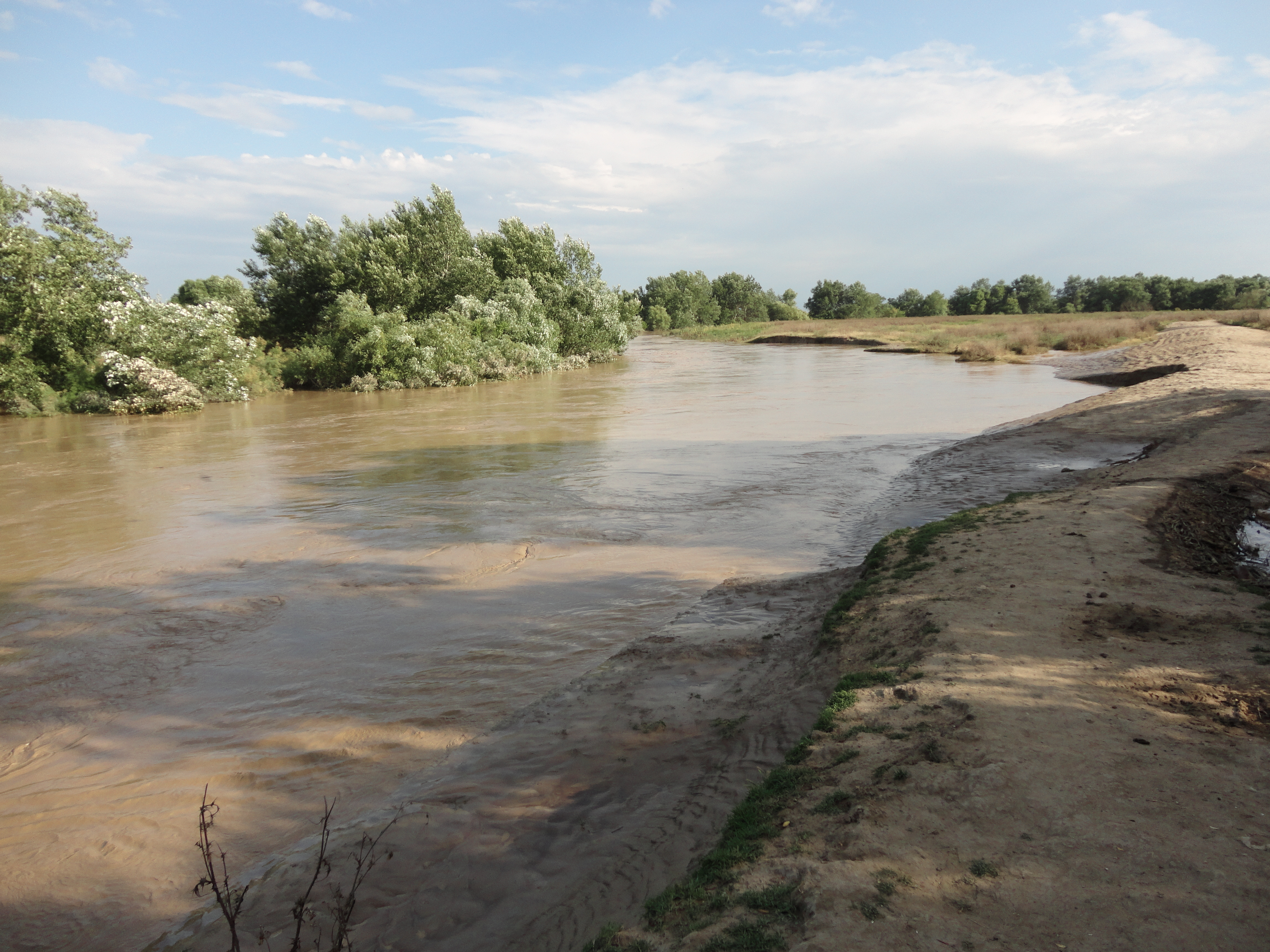 Река Акташ. с.Адильотар